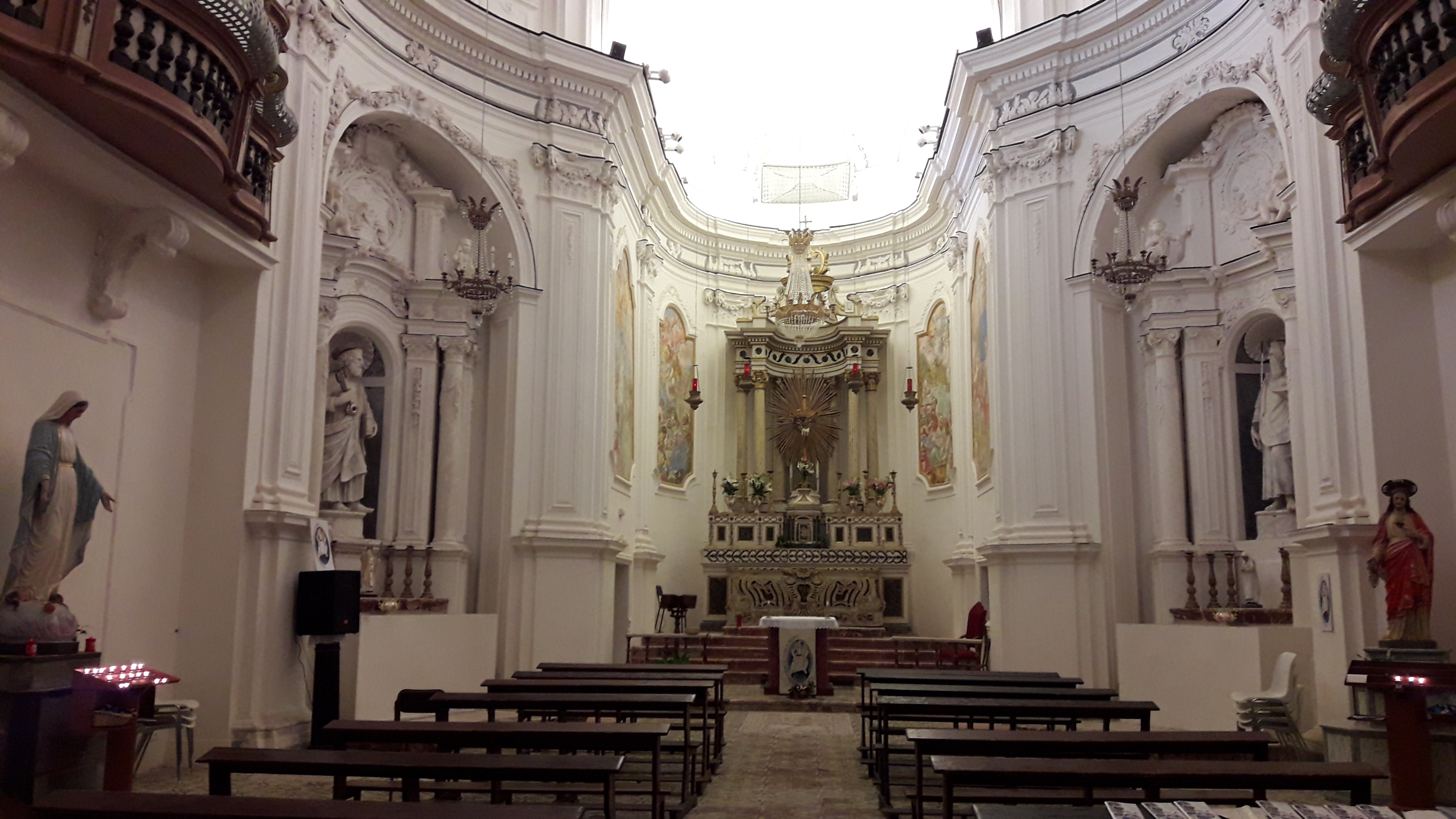 Interno della chiesa di S. Pietro, di fronte l'omonimo monastero (poi S. Rocco e oggi sede del Centro scientifico E. Majorana). Erice, Sicily